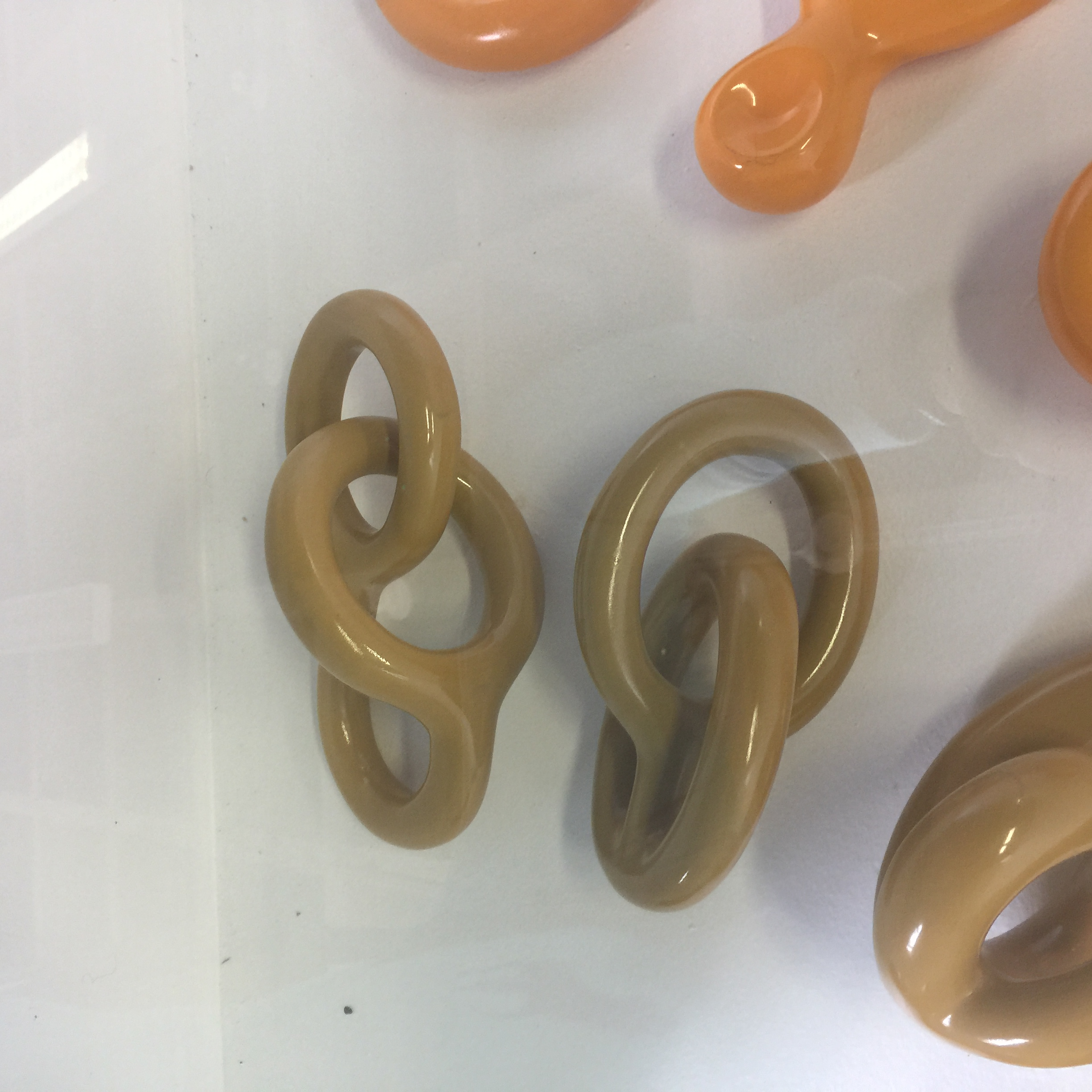 Topologia; lugar geométrico tridimensional; junção de dois toros.